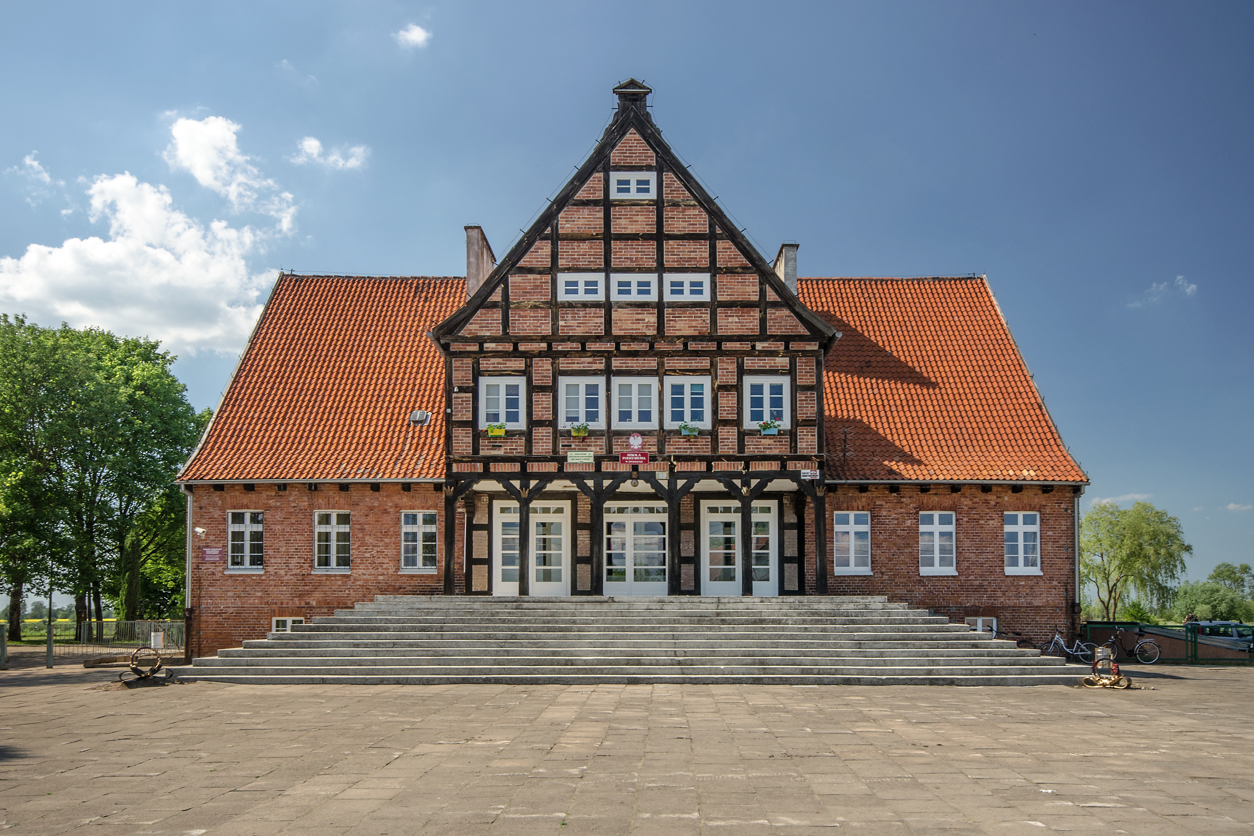 Zwierzno 28 - budynek tzw. "Dom Ludowy", ob. szkoła